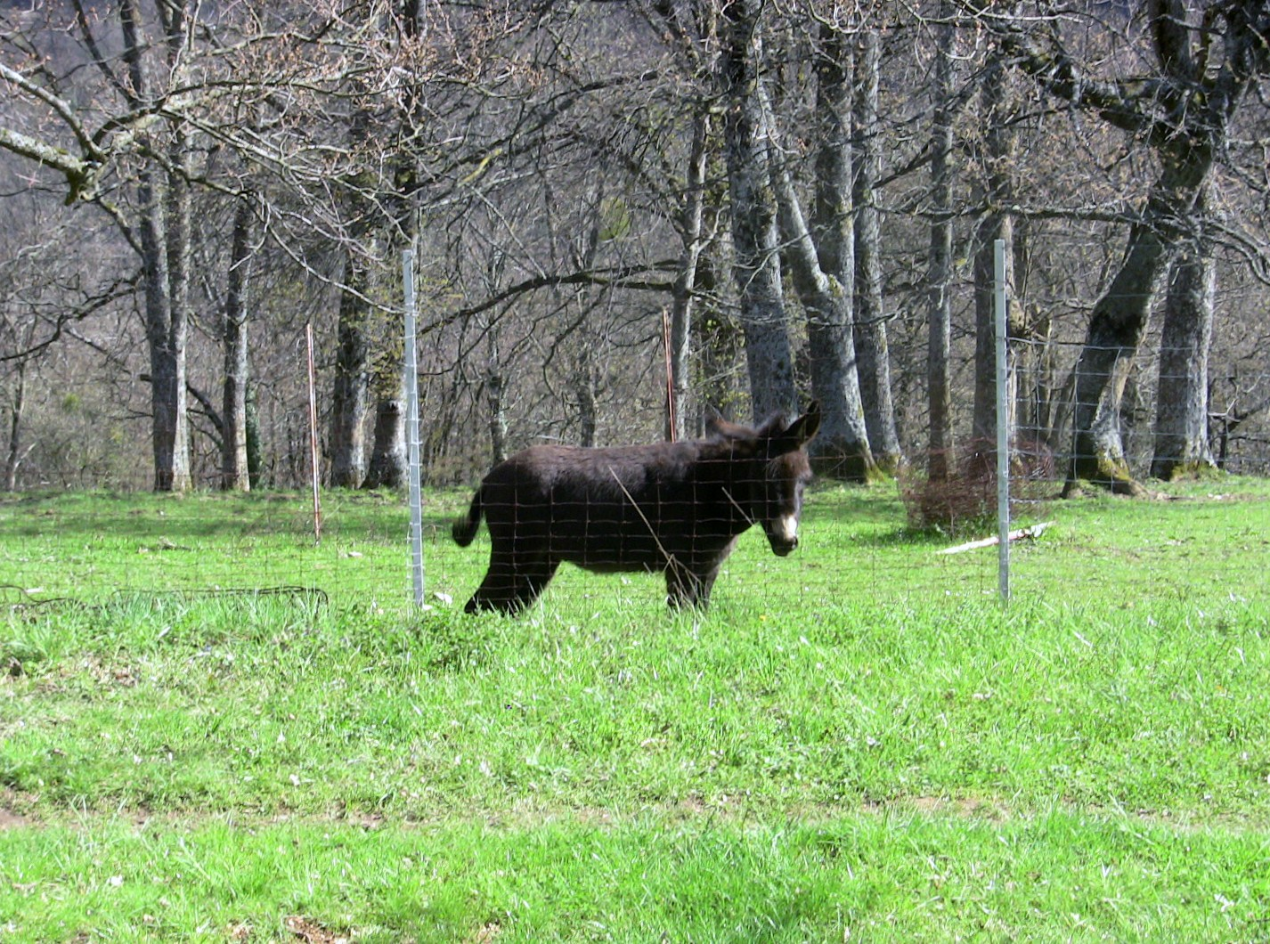 Un cheval aux Ragots, dansle quartier de Bregille à Besançon (Doubs, France).